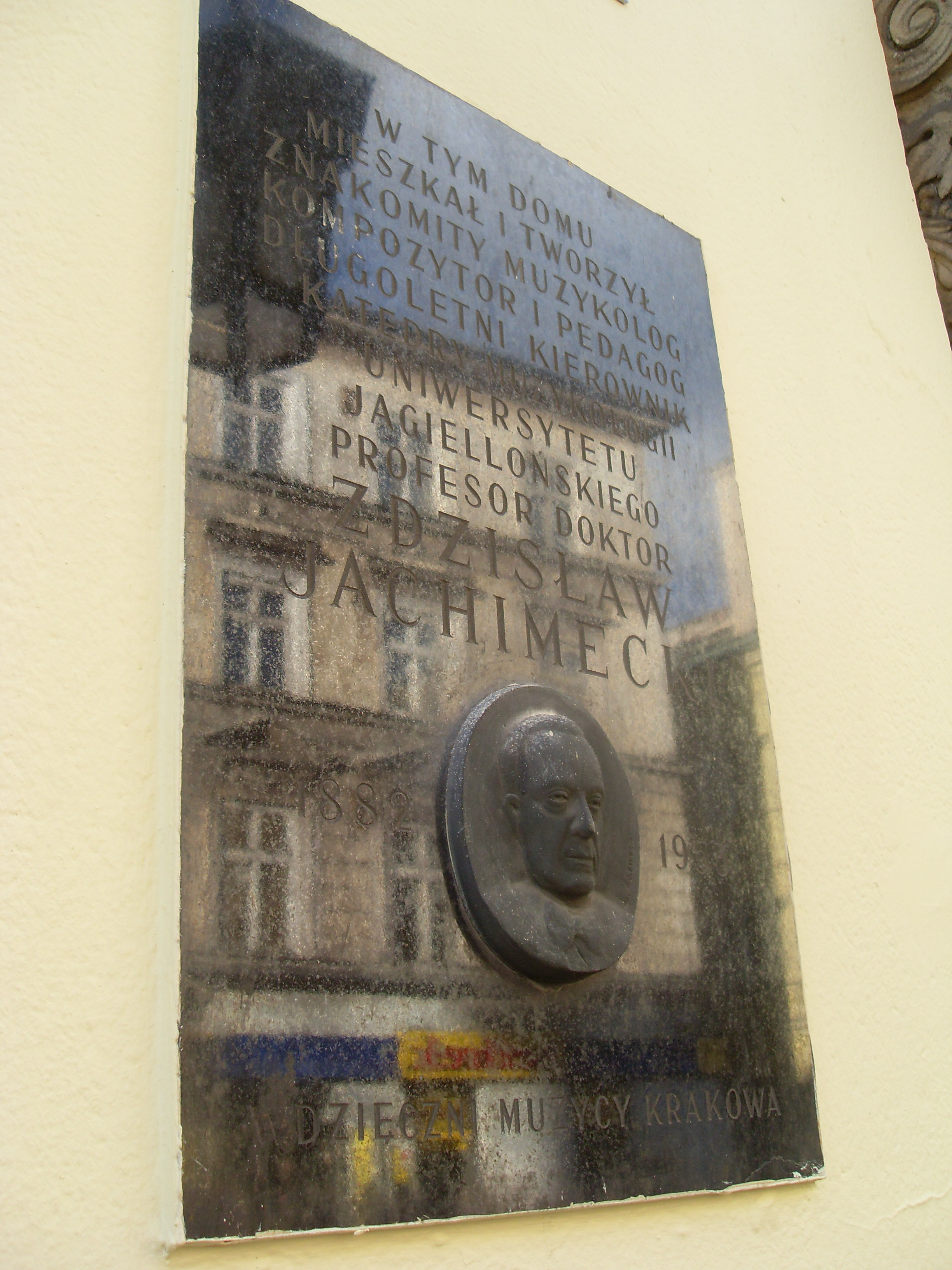 Tablica na gmachu przy ul. Grodzkiej 47 , w którym mieszkał Zdzisław Jachimecki.